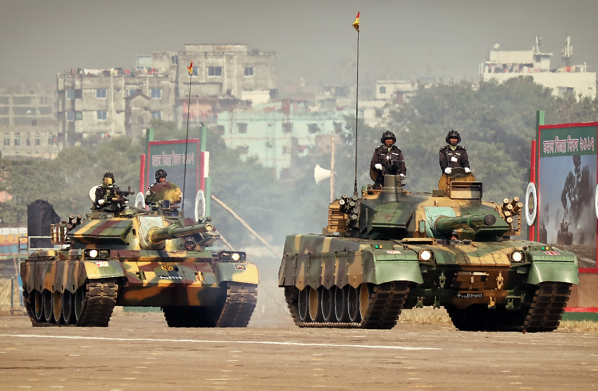 VGTJ/ VDP 2017.